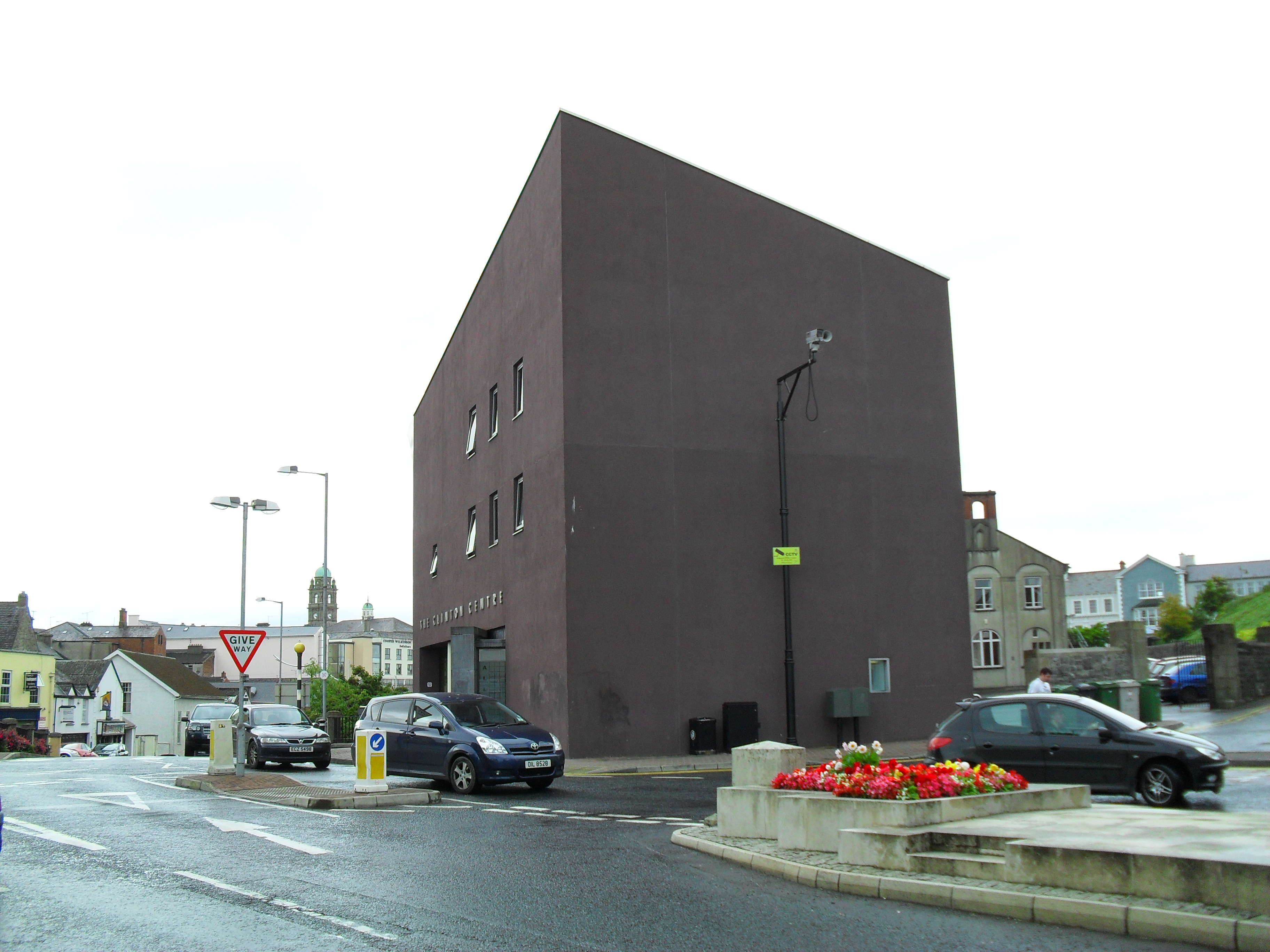 Clinton Centre, Enniskillen